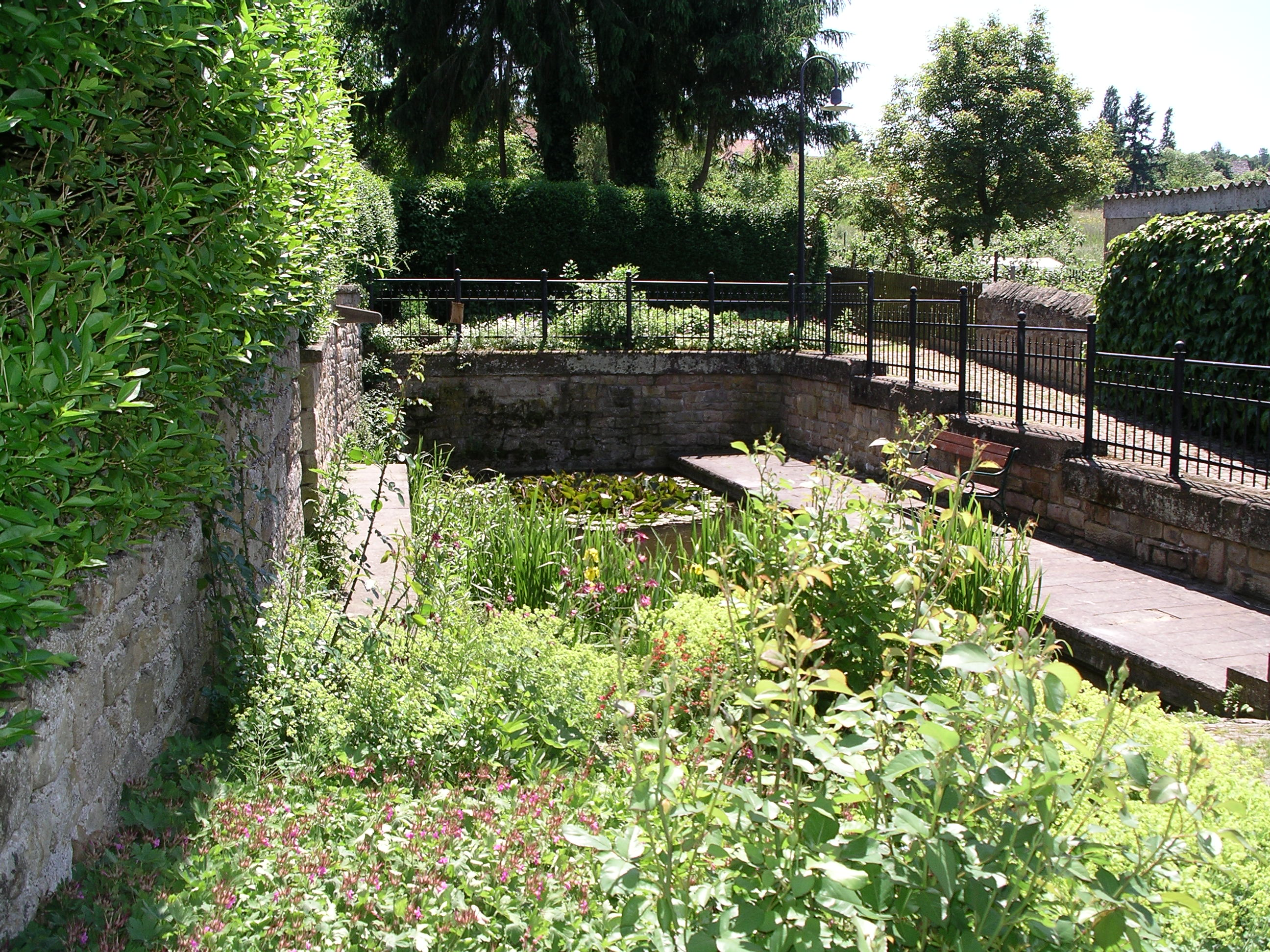 Duchroth, Weinort an der Nahe. Biet (Wasserstelle im Ort)